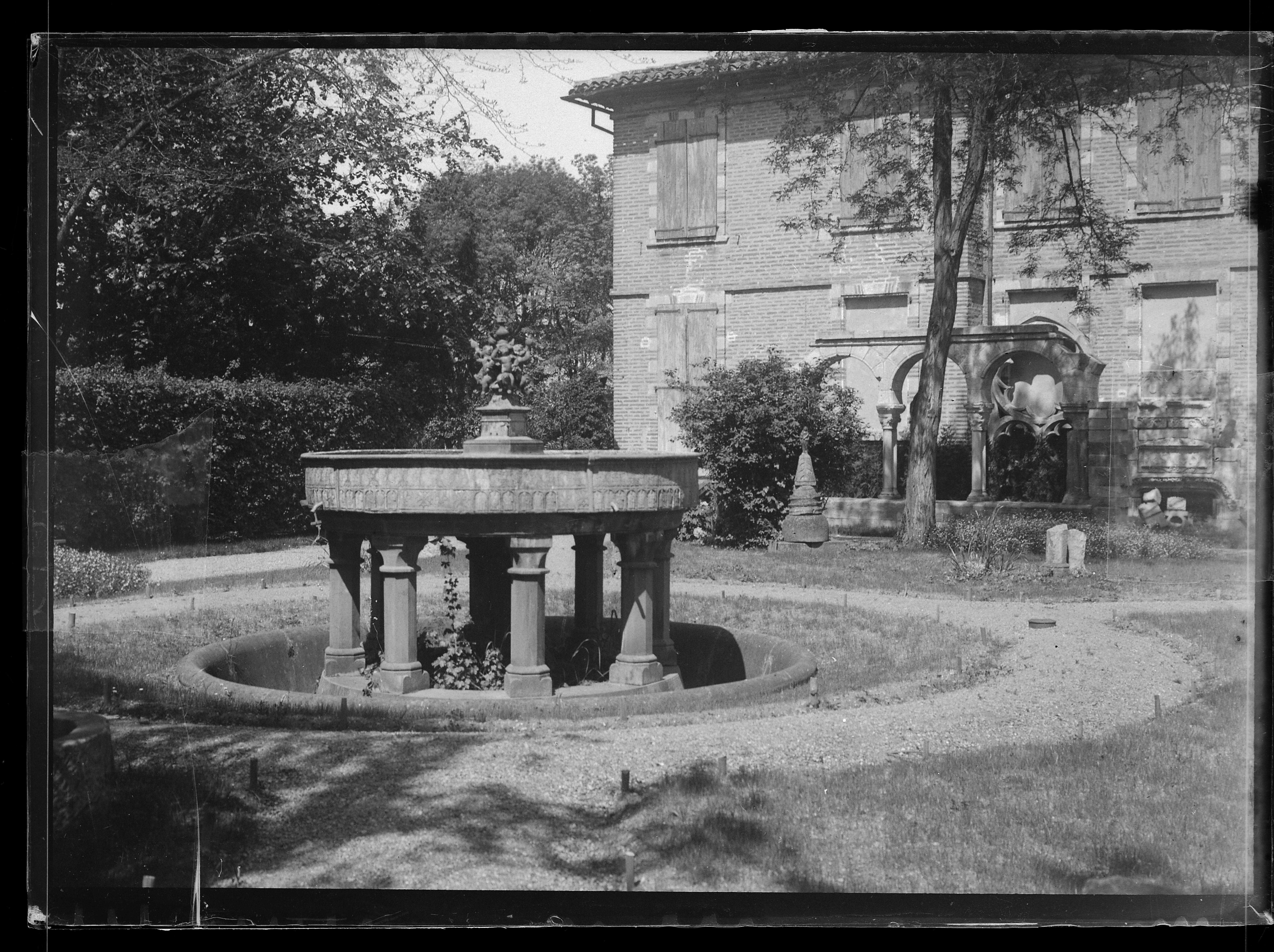 plaque négative au gélatino-bromure d'argent, format 6,5x9 cm. Inscription manuscrite par Eugène Trutat sur l'enveloppe : "30 avril 1895 Albi - Parc Rochegude fontaine de l'Isle"